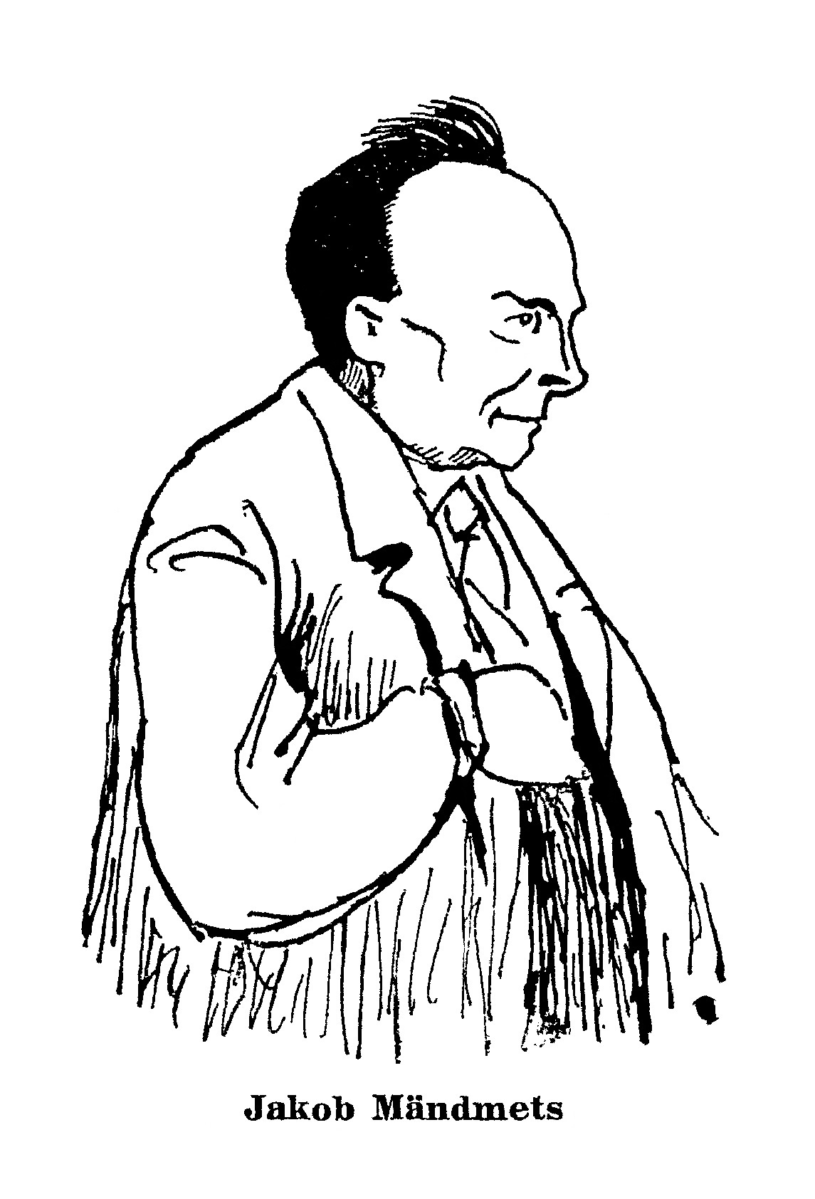 K. A. Hindrey šarž Jakob Mändmetsast